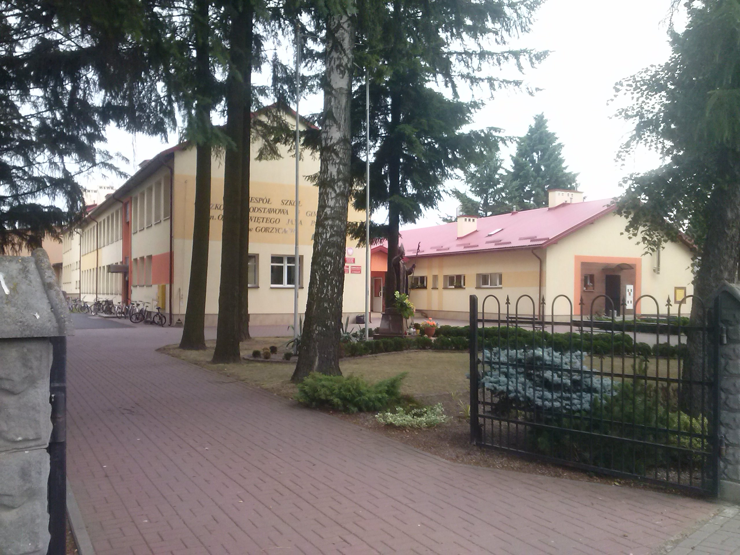 Szkoła podstawowa w Gorzycach (widoczny pomnik św. Jana Pawła II)